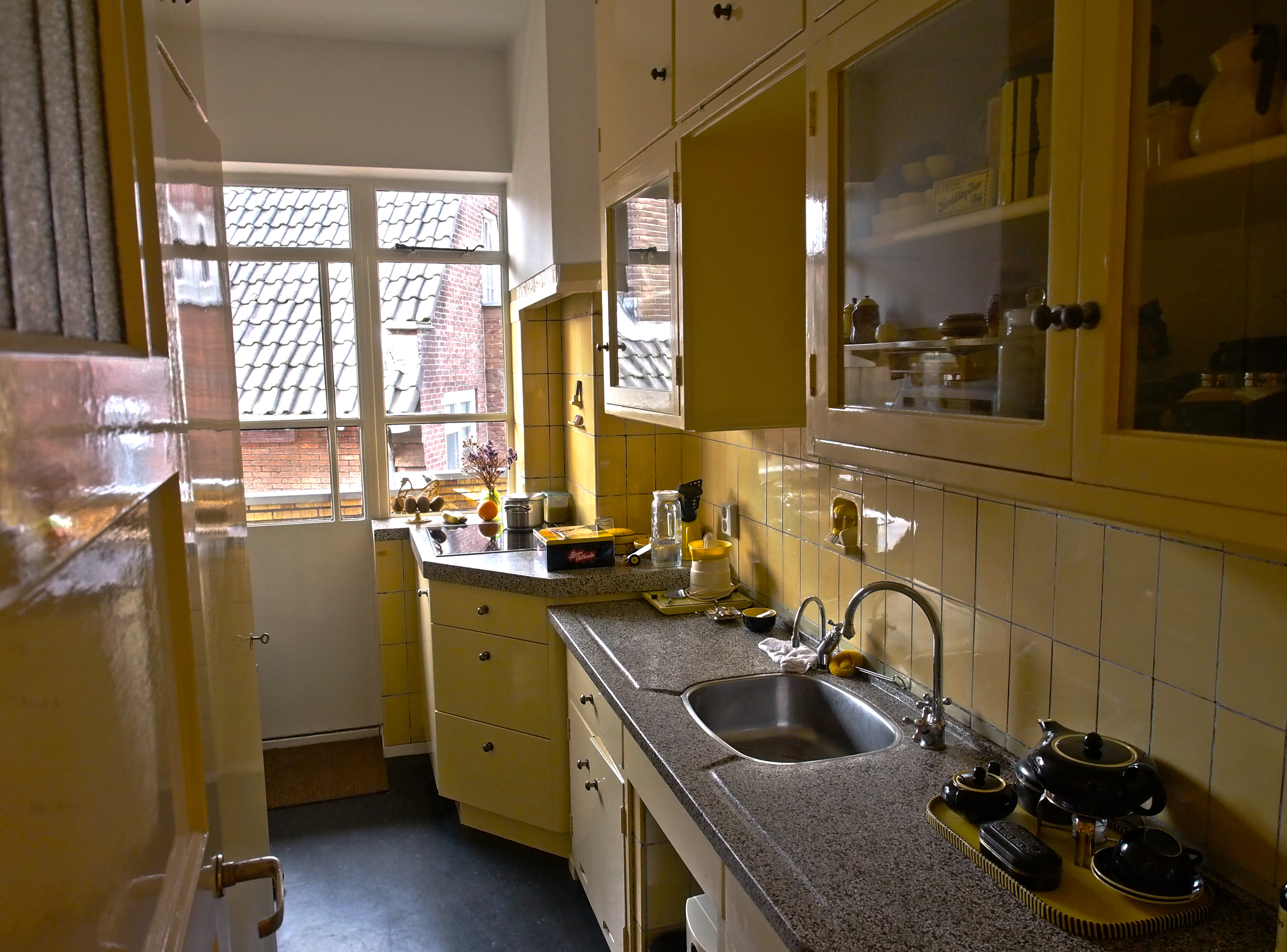 Interieur van het pand Biltstraat 62-68 ("Flatgebouw Biltstraat") te Utrecht: deels originele keuken in een van de appartementen. De foto behoort bij het artikel "Flatgebouw Biltstraat: ‘geel kasteel’ met een oorlogsverleden", in: De Utrechtse Internet Courant (DUIC), 5 mei 2015. Utrechts Archief - Catalogusnummer 827984